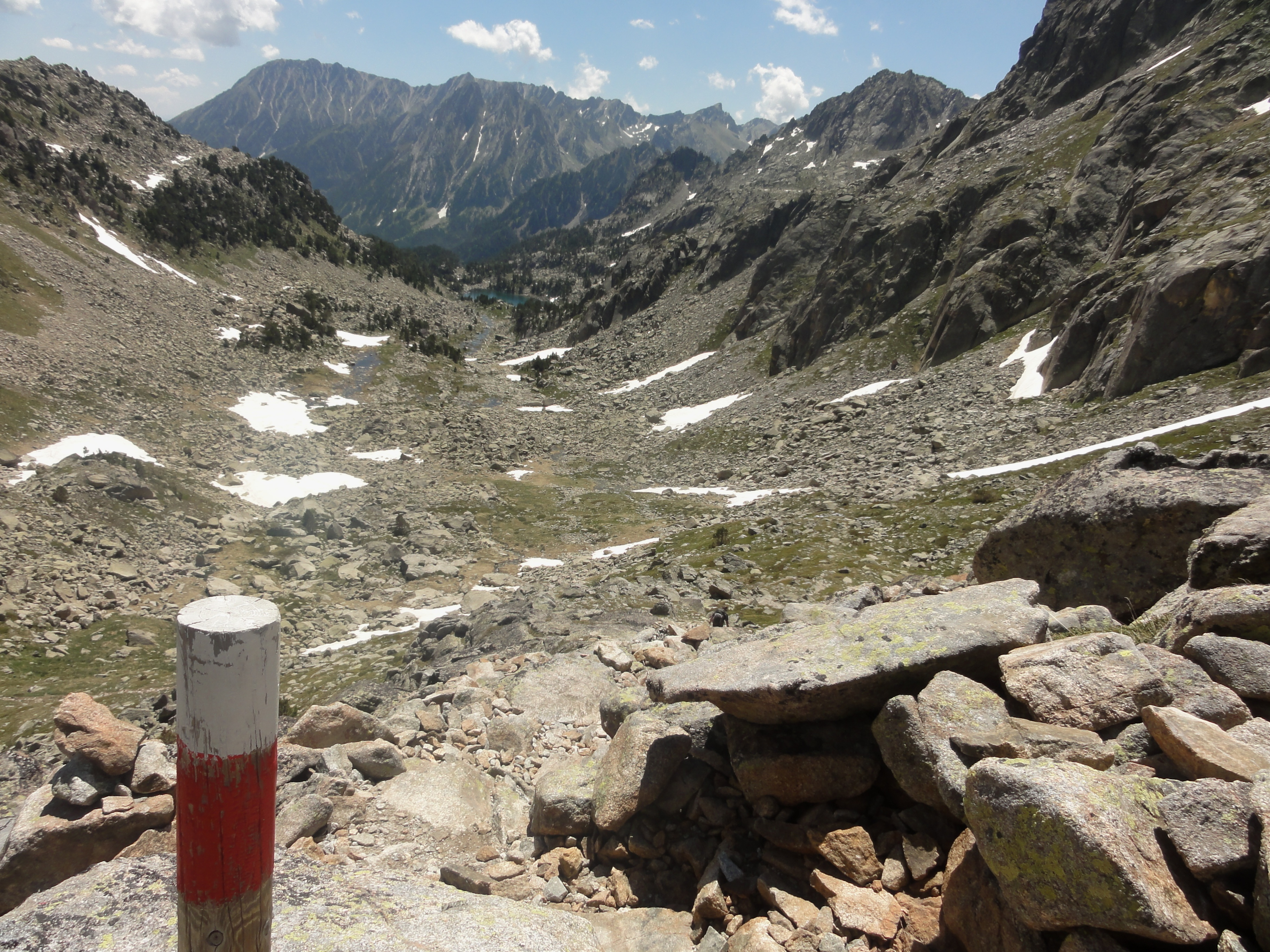 Aigüestortes This is a a photo of a natural area in Catalonia, Spain, with id: ES510081